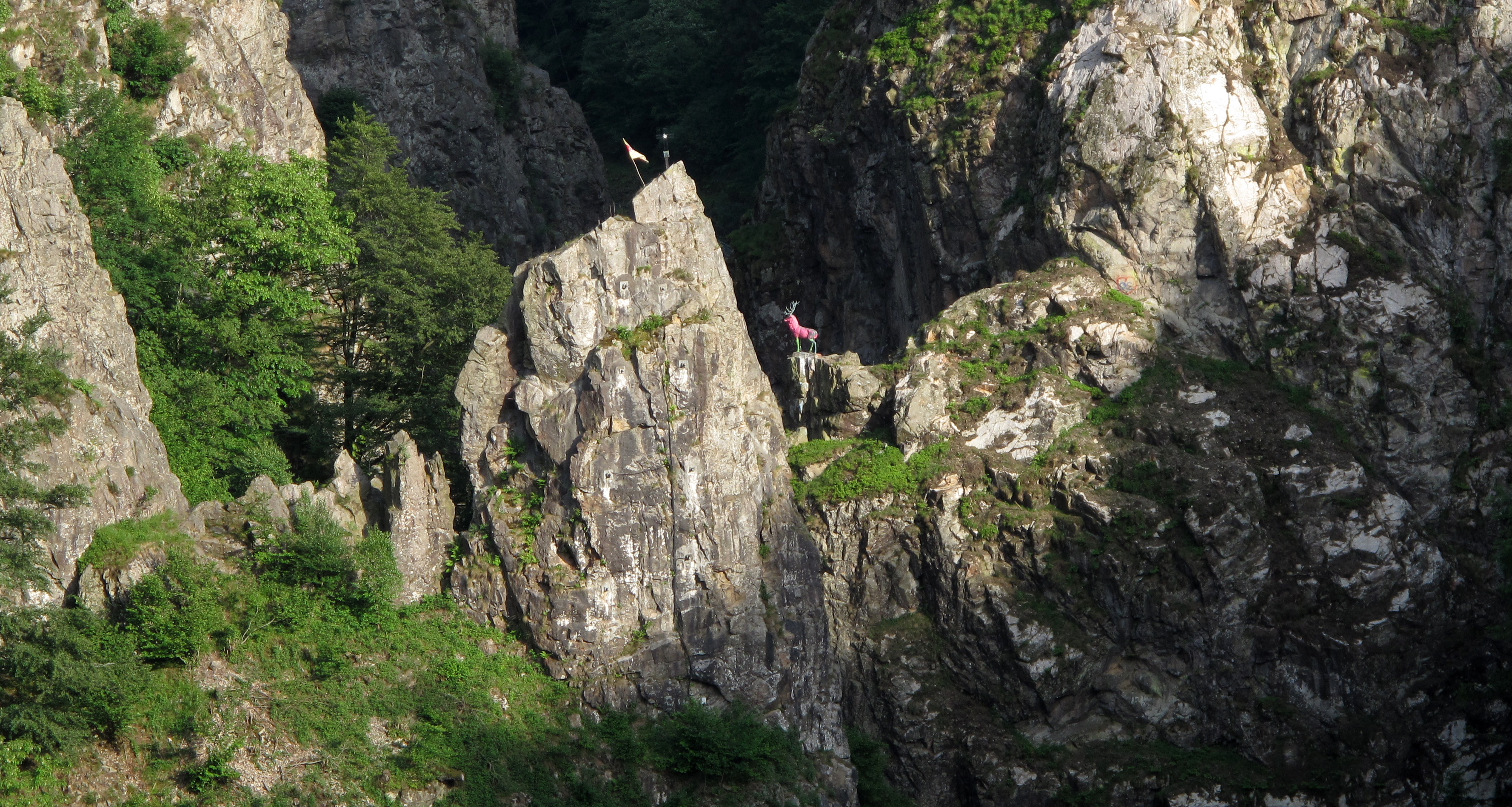 Blick vom vordersten Bebauungsrest der Oberburg Richtung Hirschsprung mit der bronzenen Hirschstatue.